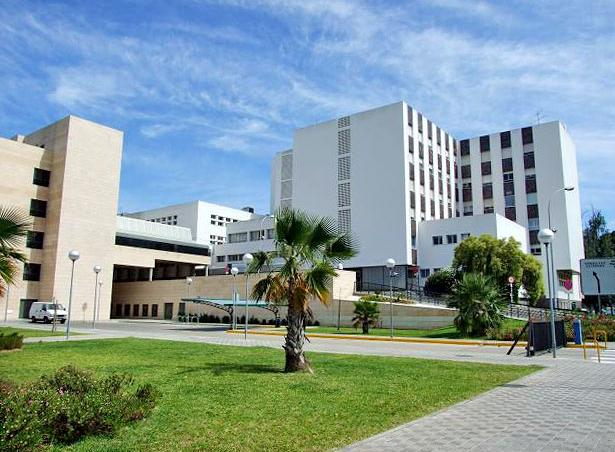 Hospital Universitario Reina Sofía, Córdoba